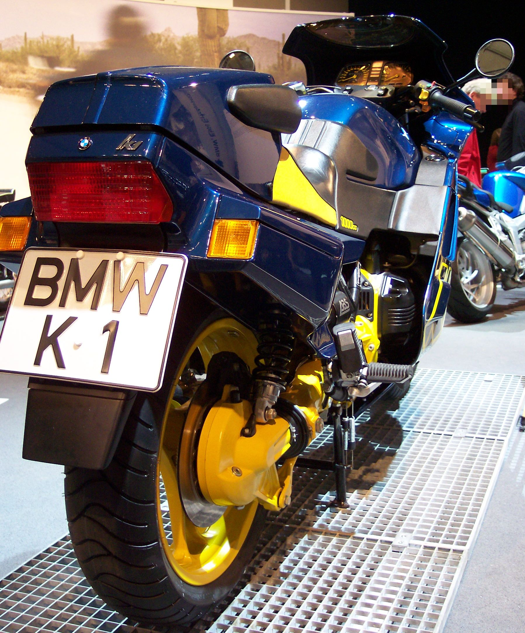 BMW K1 blue 1993